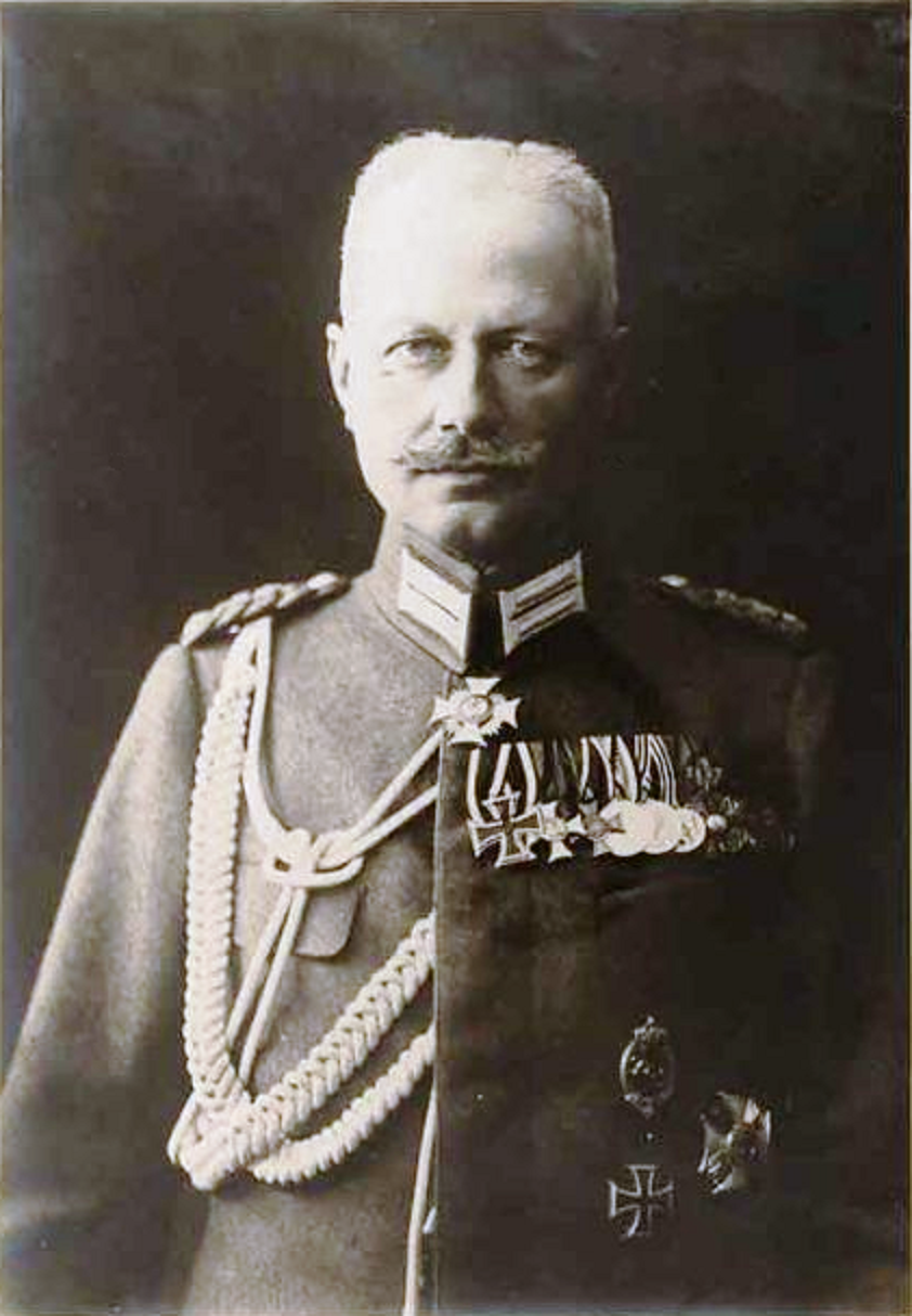 Friedrich ("Fritz") Gustav Theodor von Graevenitz (geboren: 7. Januar 1861 in Asperg, gestorben: 28. Februar 1922, in Solitude in Stuttgart), General der Infanterie, Generaladjutant 1918 in Uniform mit Orden, Brustbild